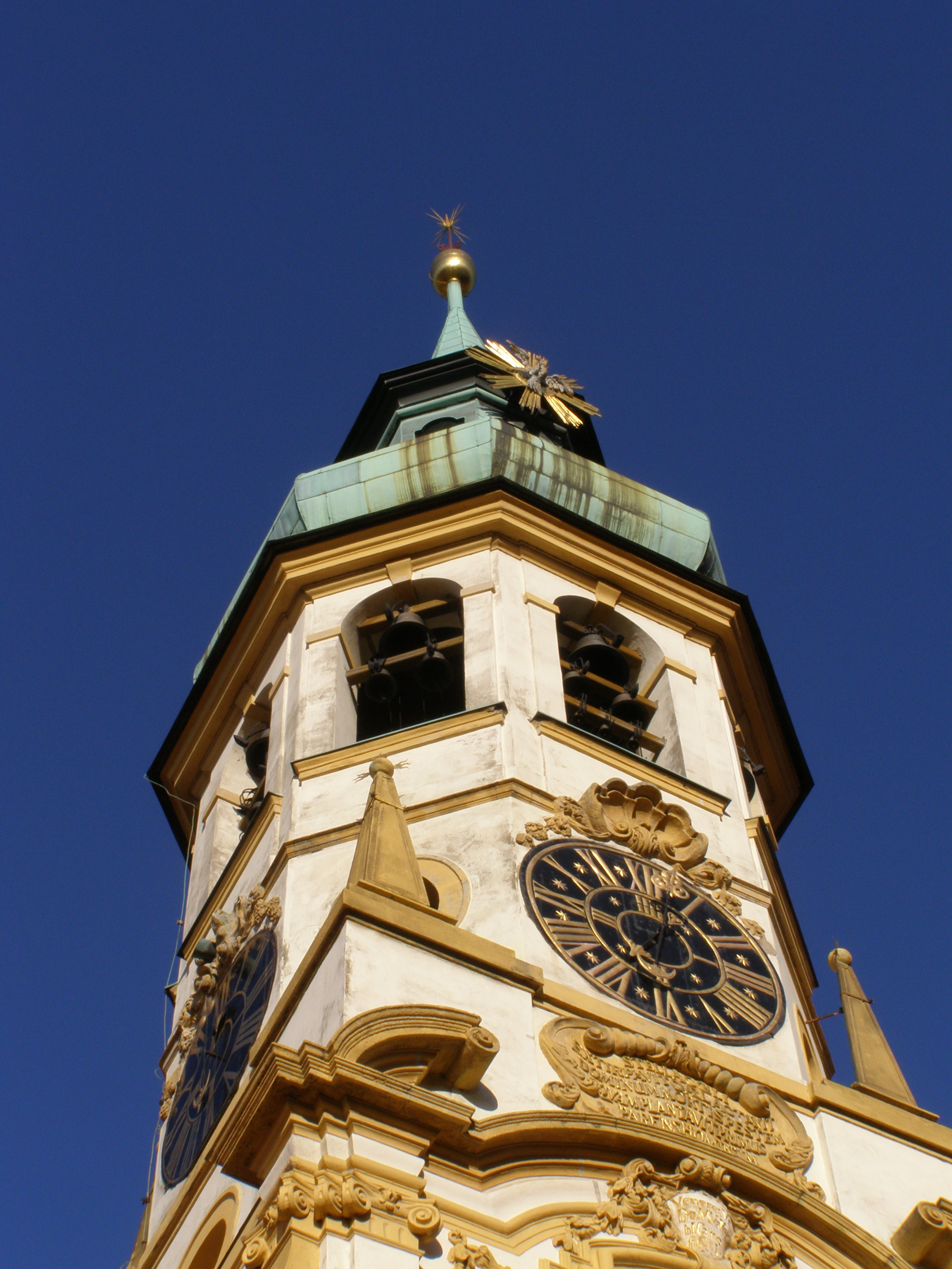 Praha, Hradčany, Loreta, věž v průčelí objektu